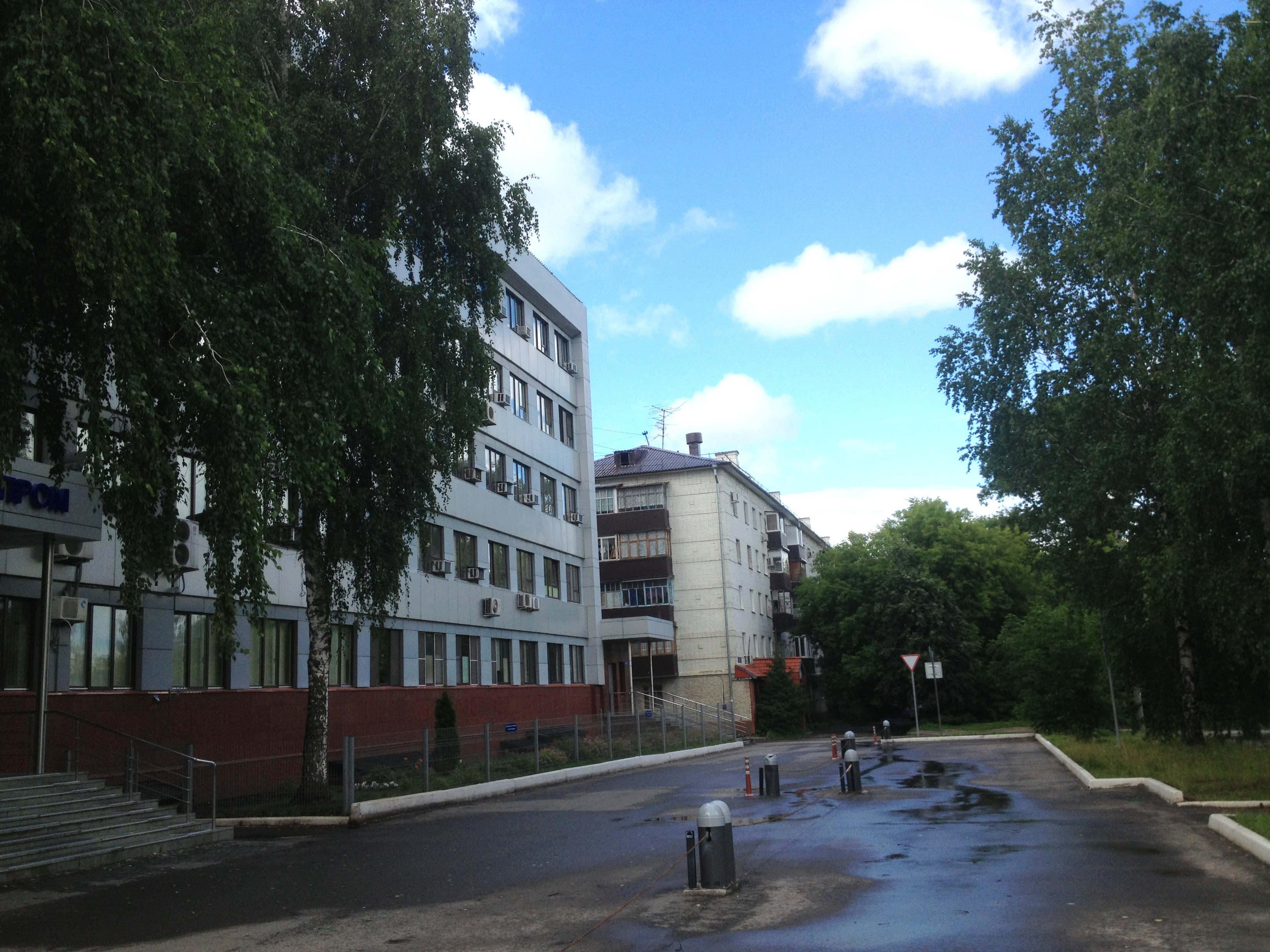 Улица Дементьева в районе здания Акционерного общества «Казанский Гипронииавиапром» (ул. Дементьева, д. 1)